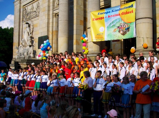 FVKS-Konzert, "Kinder brauchen Musik" mit Rolf Zuckowski